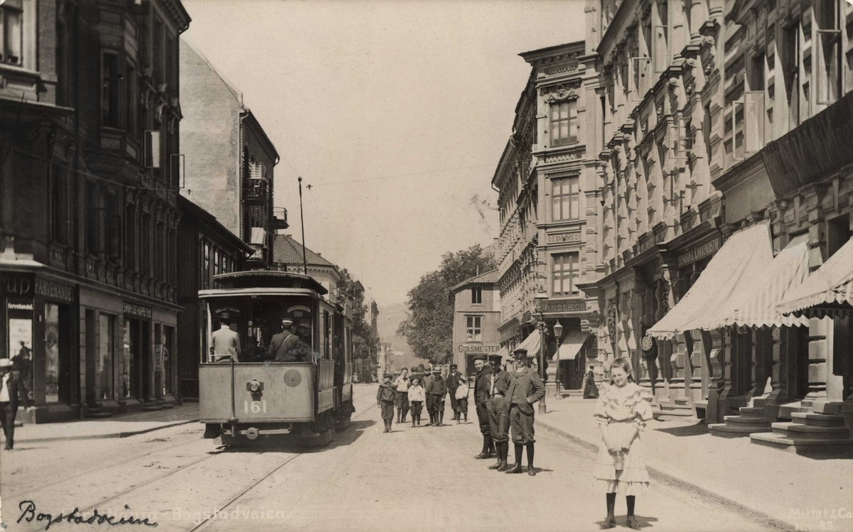 Trikk i Bogstadveien, ca. 1905. Vi ser stykket fra Dronning Astrids gate til Indsustrigata. På høyresiden ses husrekken fra nr. 21 til 27 samt Industrigata 41 (trehus som stikker ut; revet og erstattet med Bogstadveien 27B). Husrekken på venstre side er senere trukket inn fra gaten, unntatt nr. 24, som er den eneste gården som fortsatt står. Ellers ses nr. 26 (lavt trehus) og 28 (høyere murhus) samt Industrigata 40 (murgård bak trikken). Mittet-postkort fra ca. 1905. Fra Byhistorisk samling hos Oslo Museum.